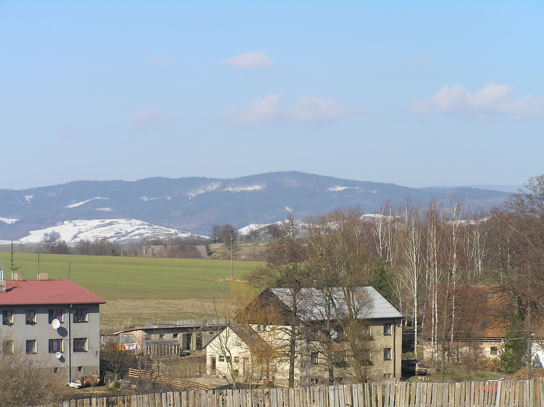 The Javoří hory Mountains